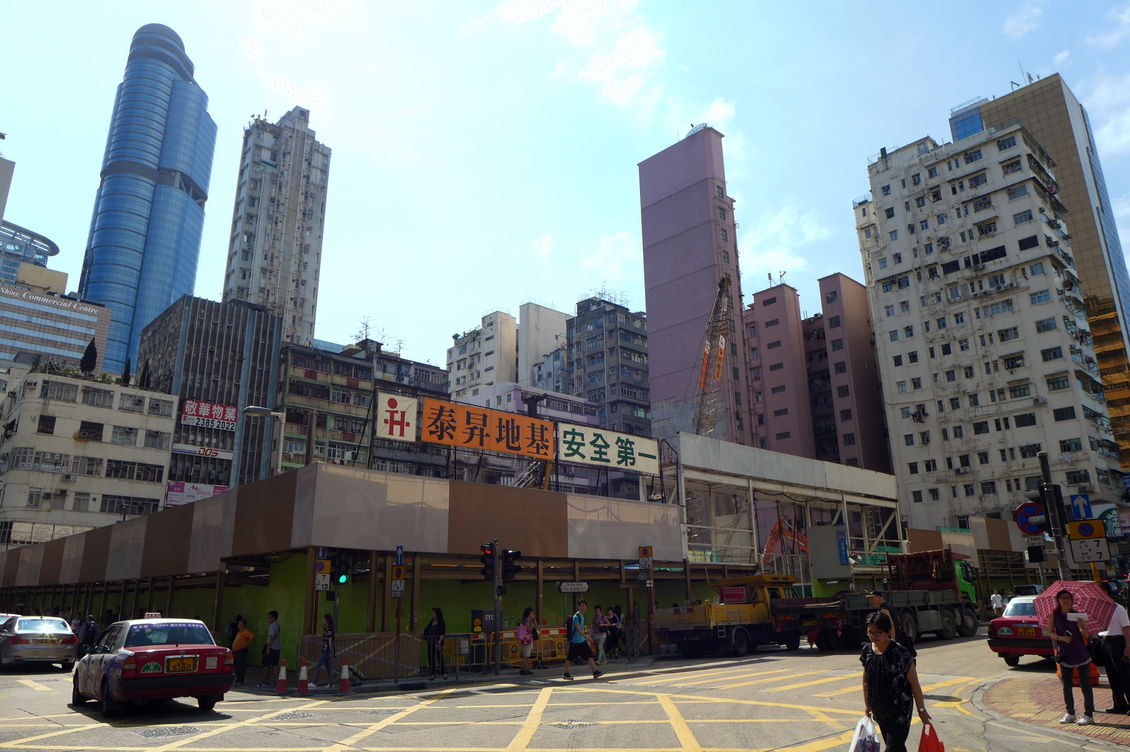 Fa Yuen Street URA Redevelopment Site